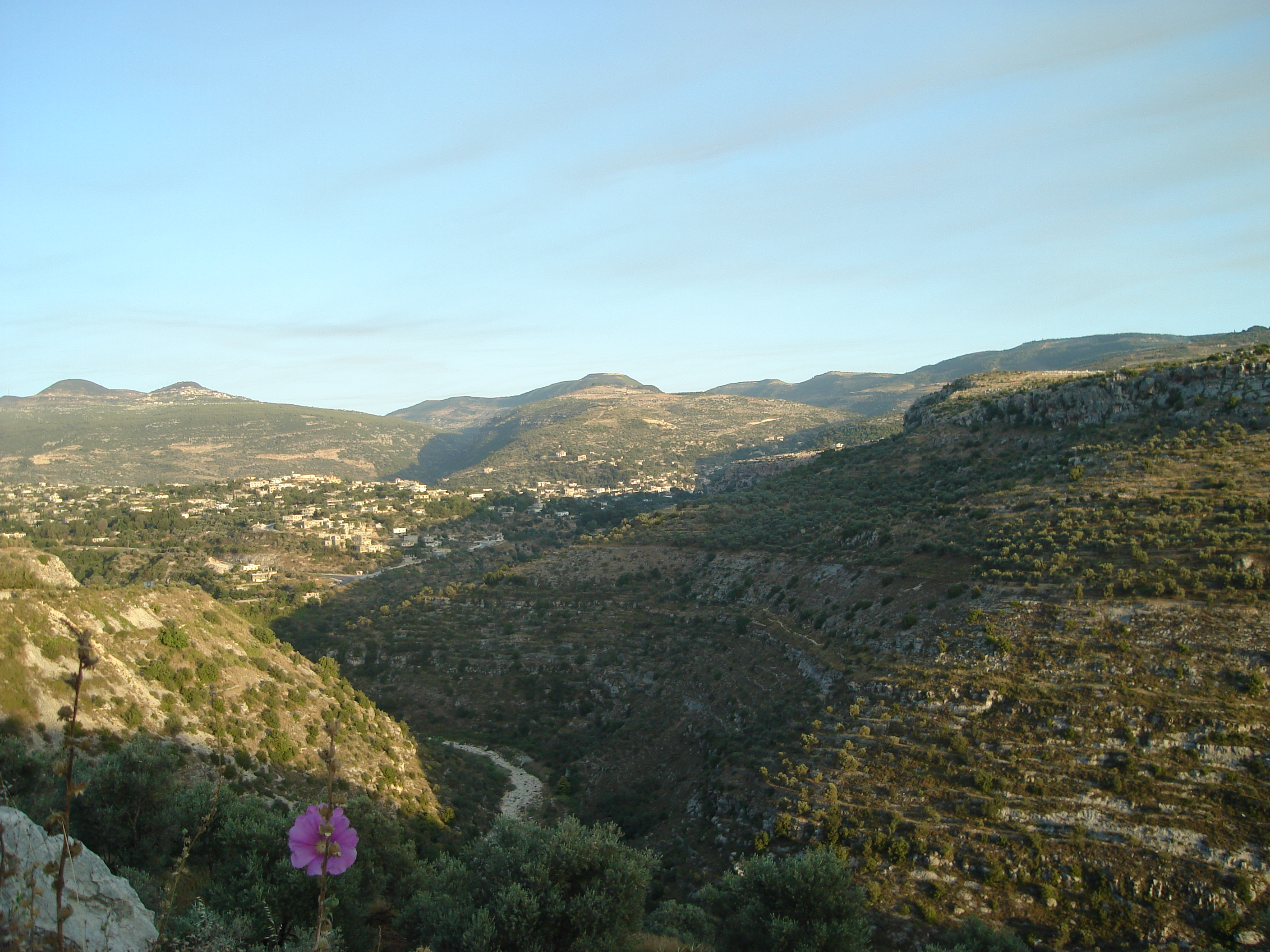 بيت ياشوط من الغرب ، وتبدو التضاريس الجبلية والنهر.